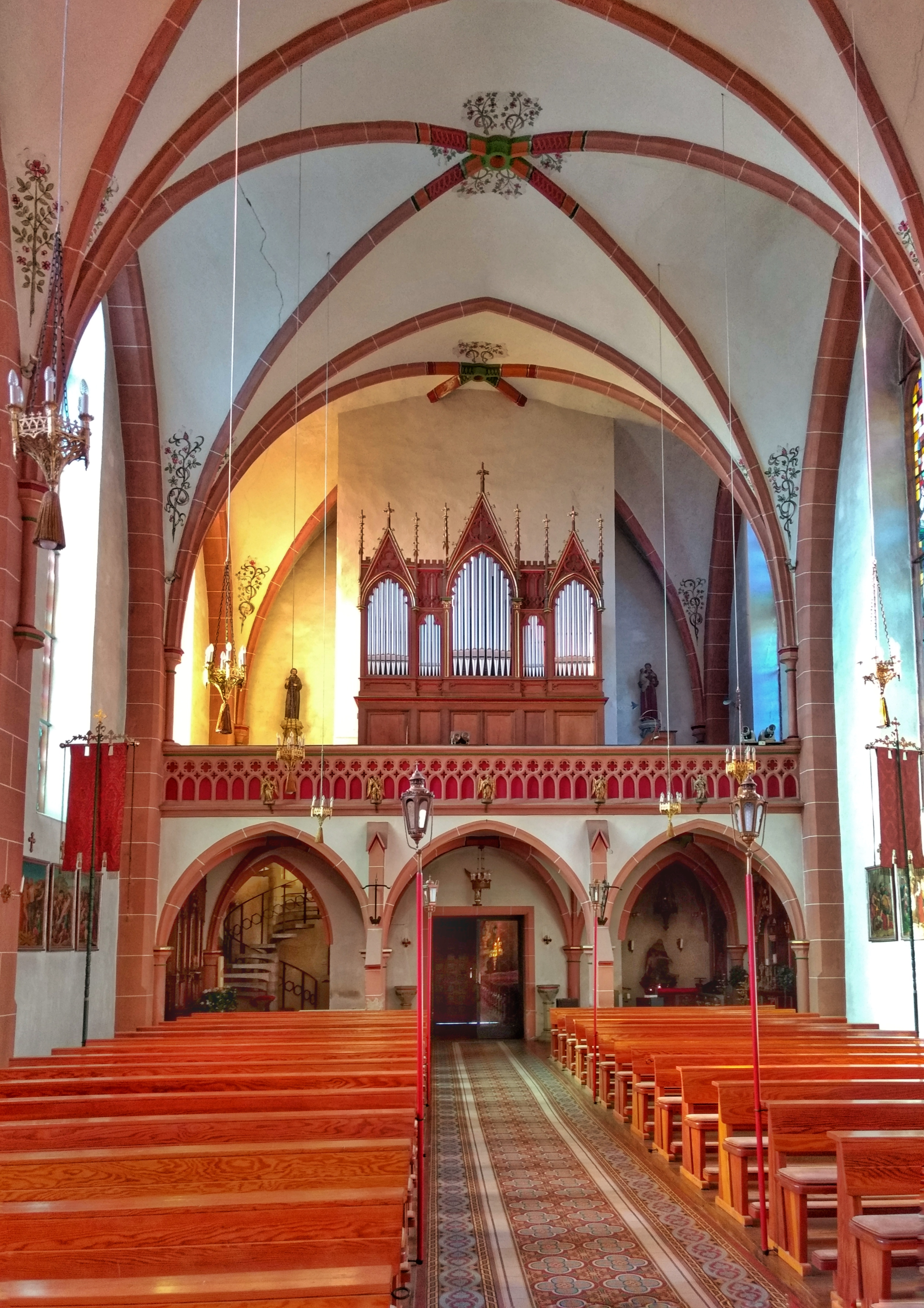 St. Rufus Niedaltdorf